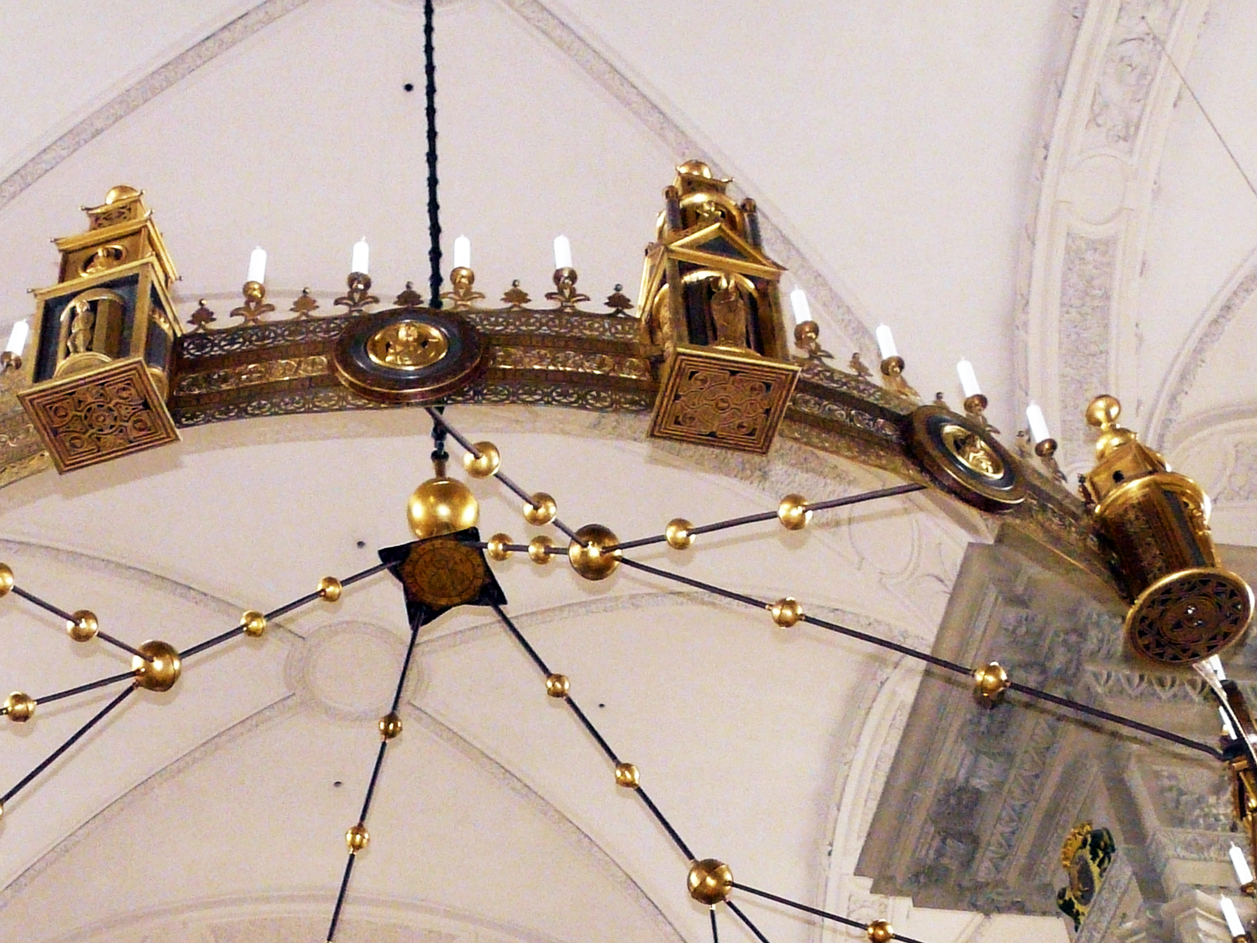 Фрагмент светильника